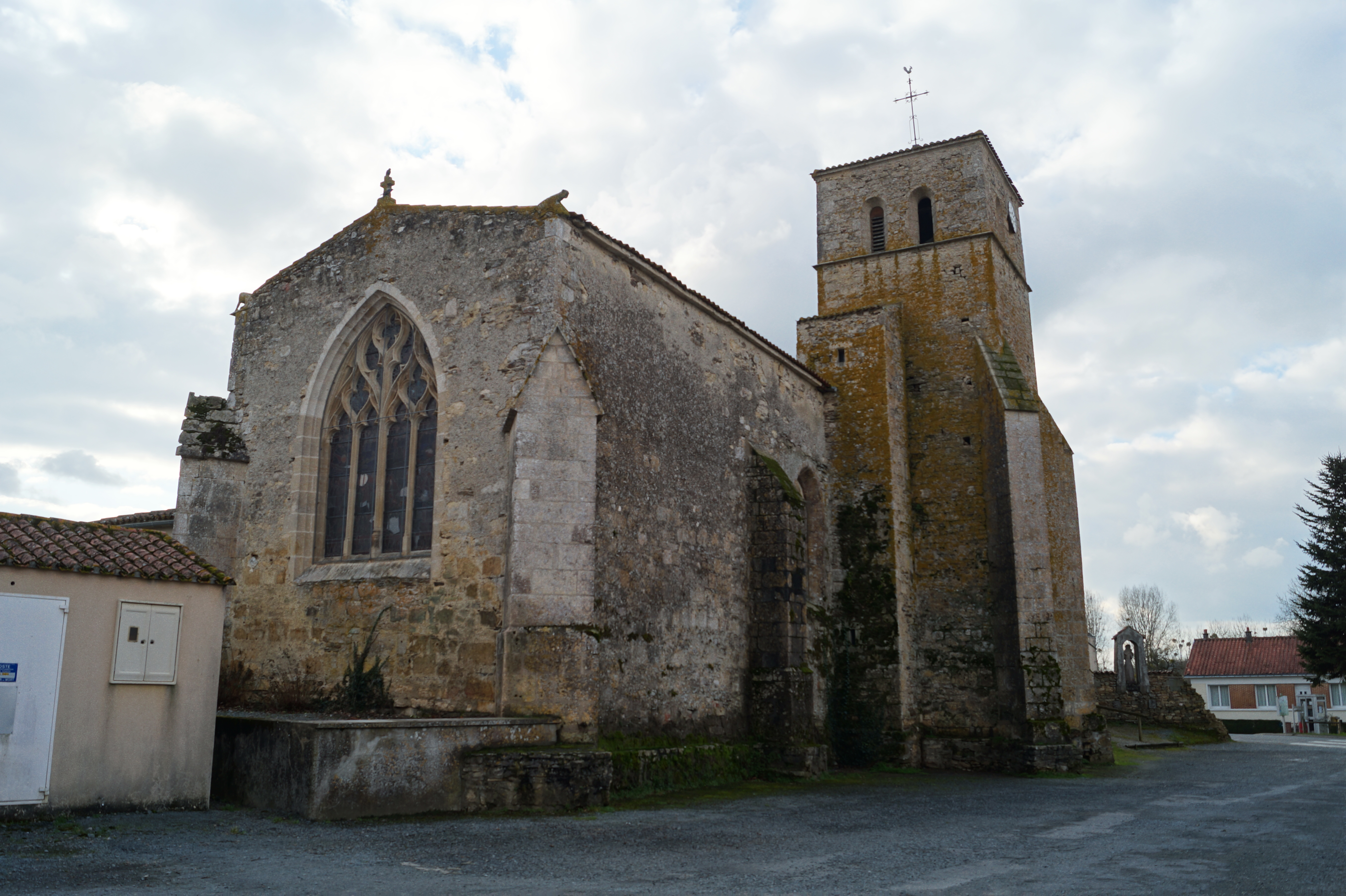 L’église Saint-Maurice de Saint-Maurice-le-Girard.